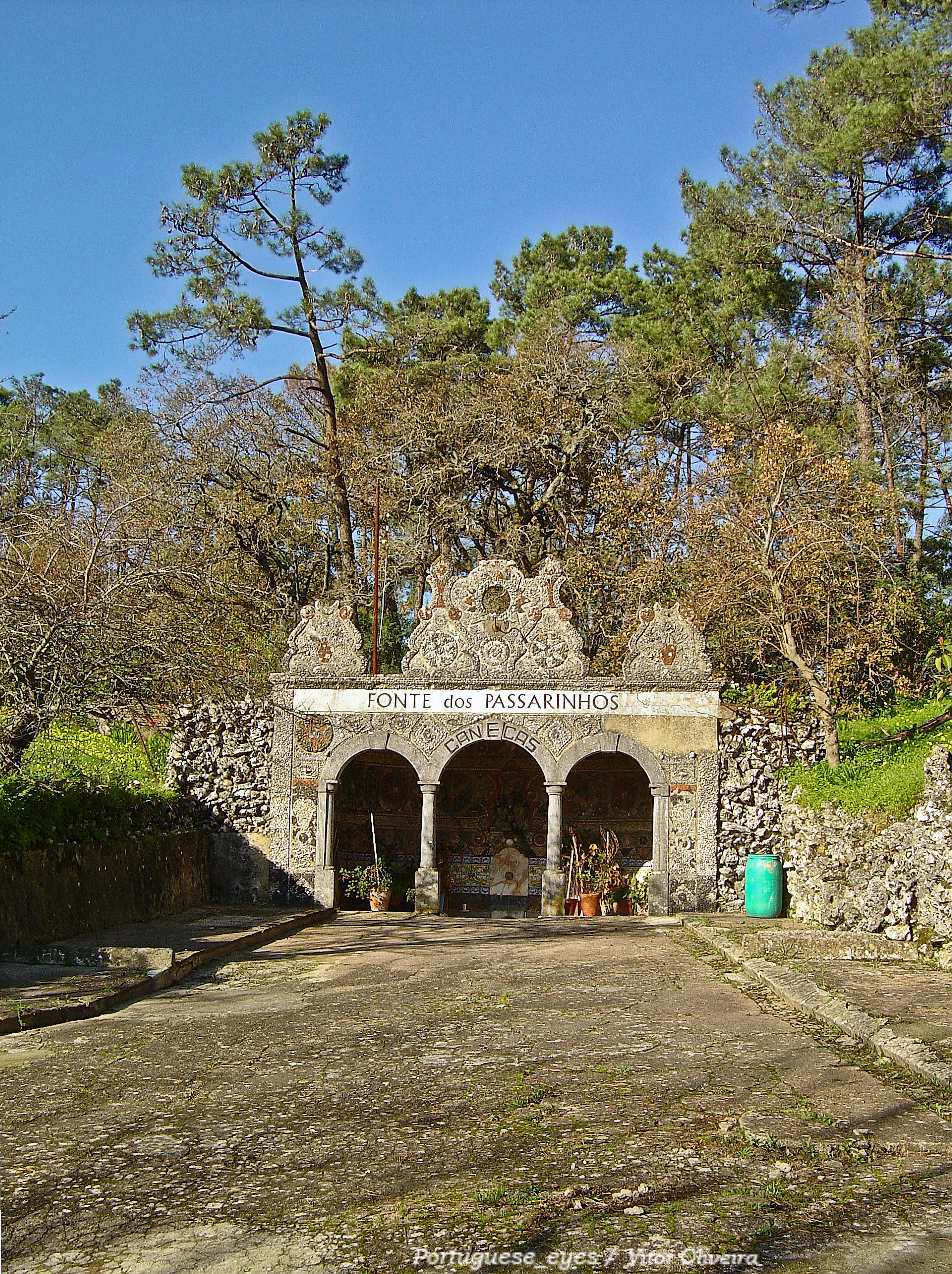 Situada a meia encosta da serra de Caneças. Construída nos finais de 1933, inaugurada em 1934, tal como as restantes teve o seu esplendor nas décadas de 30 e 40. Relativamente aos seus fundadores a informação existente aponta para Joaquim Fernandes Lapa e Manuel Duarte Mourisco. Esta fonte tem uma decoração realizada com conchas de molusco, fragmentos cerâmicos e seixos do rio. Concedida a licença para comercialização de água de mesa, por portaria de 1935, a Empresa Fonte dos Passarinhos explorava e vendia a sua água nas tradicionais bilhas de barro. Em 1960 recebeu directrizes da antiga Direcção Geral de Minas e Serviços Geológicos para proceder a um novo licenciamento que não teve continuidade. Esta Fonte encontra-se inserida numa propriedade repleta de arvoredo. Localização: Rua da Fonte dos Passarinhos, Caneças